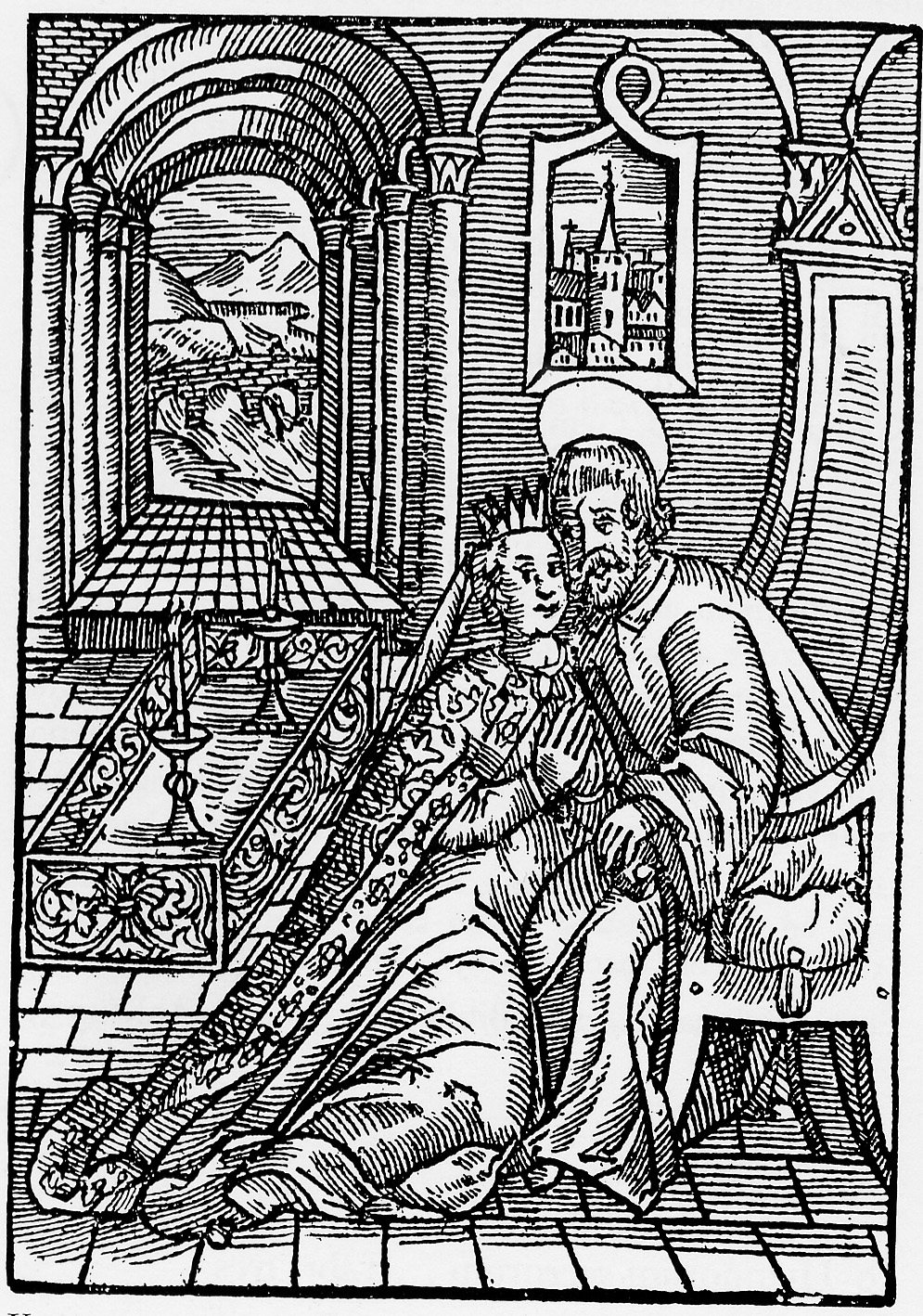 Älteste bekannte bildliche Darstellung Jan Nepomuks (1602), gezeigt als Beichtheiliger: Johannes von Nepomuk mit Heiligenschein nimmt der jungen Königin die Beichte ab. In der Bildmitte links erkennt man das erste Grabmal Nepomuks im Veitsdom mit Gitter und Kerzen, aus dem Fenster sieht man die Prager Karlsbrücke.